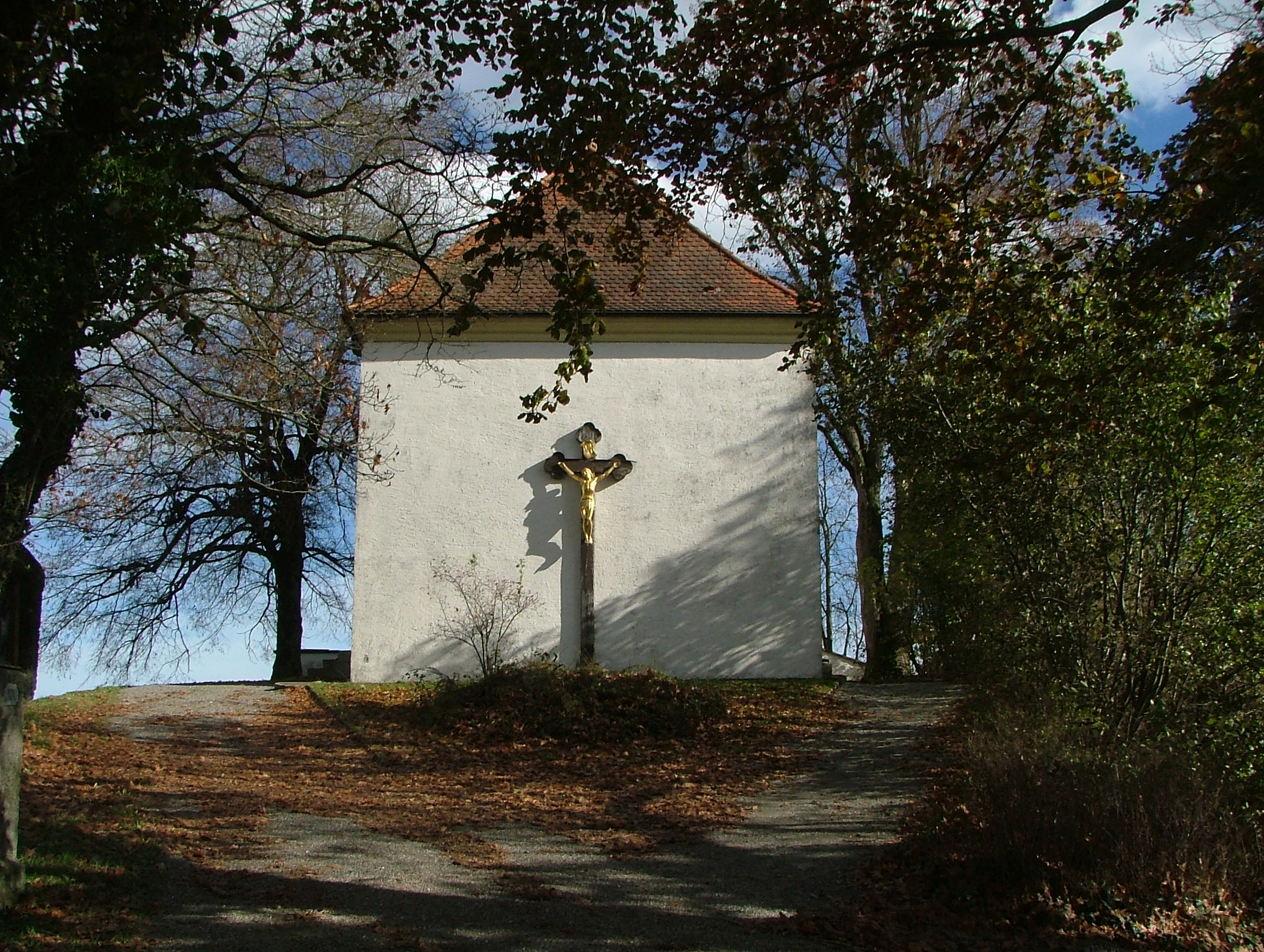 Südseite mit Kreuz